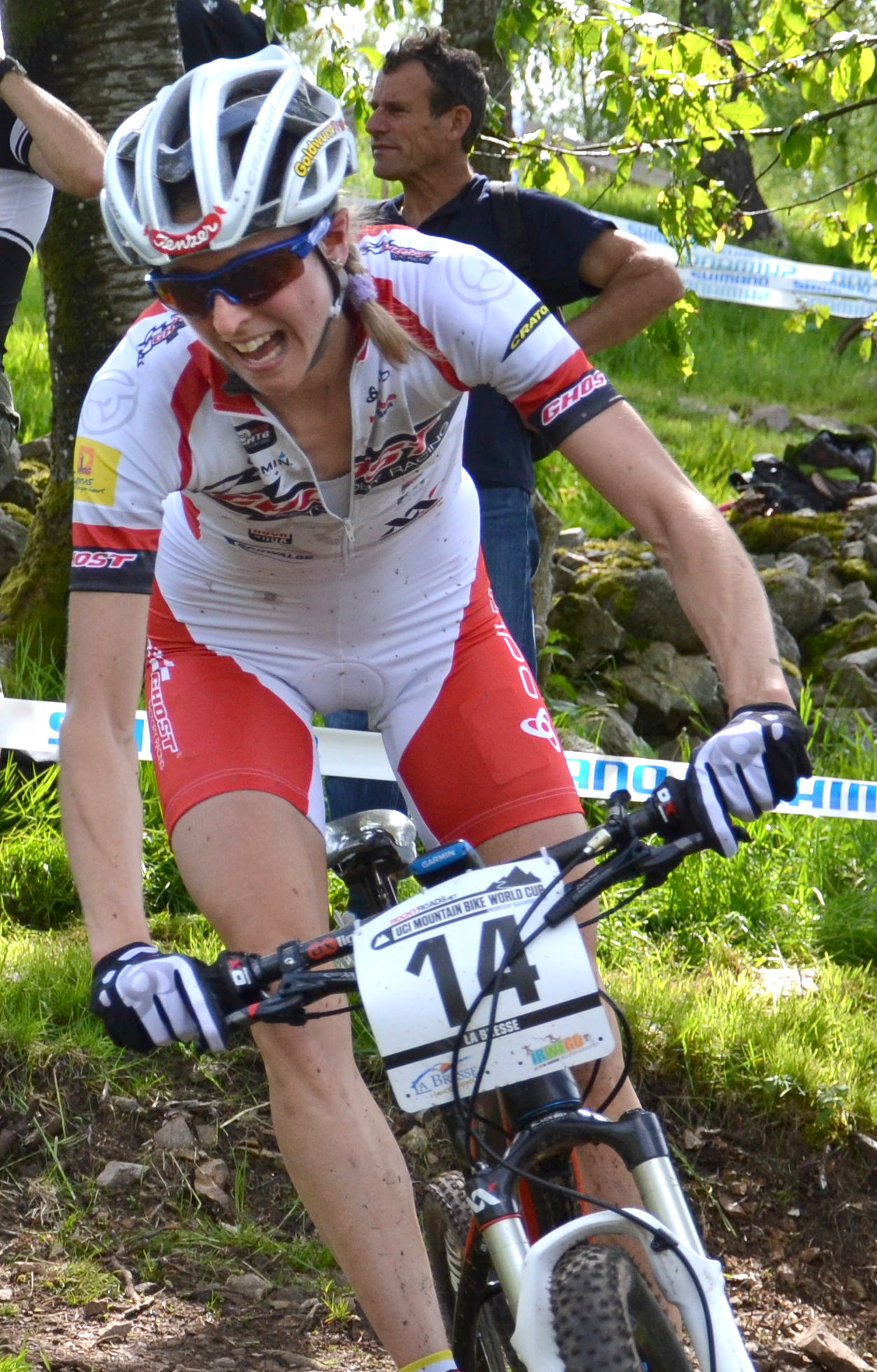 Katrin Leumann lors de la 4e manche de la coupe du monde de VTT 2012 à La Bresse (FRA).